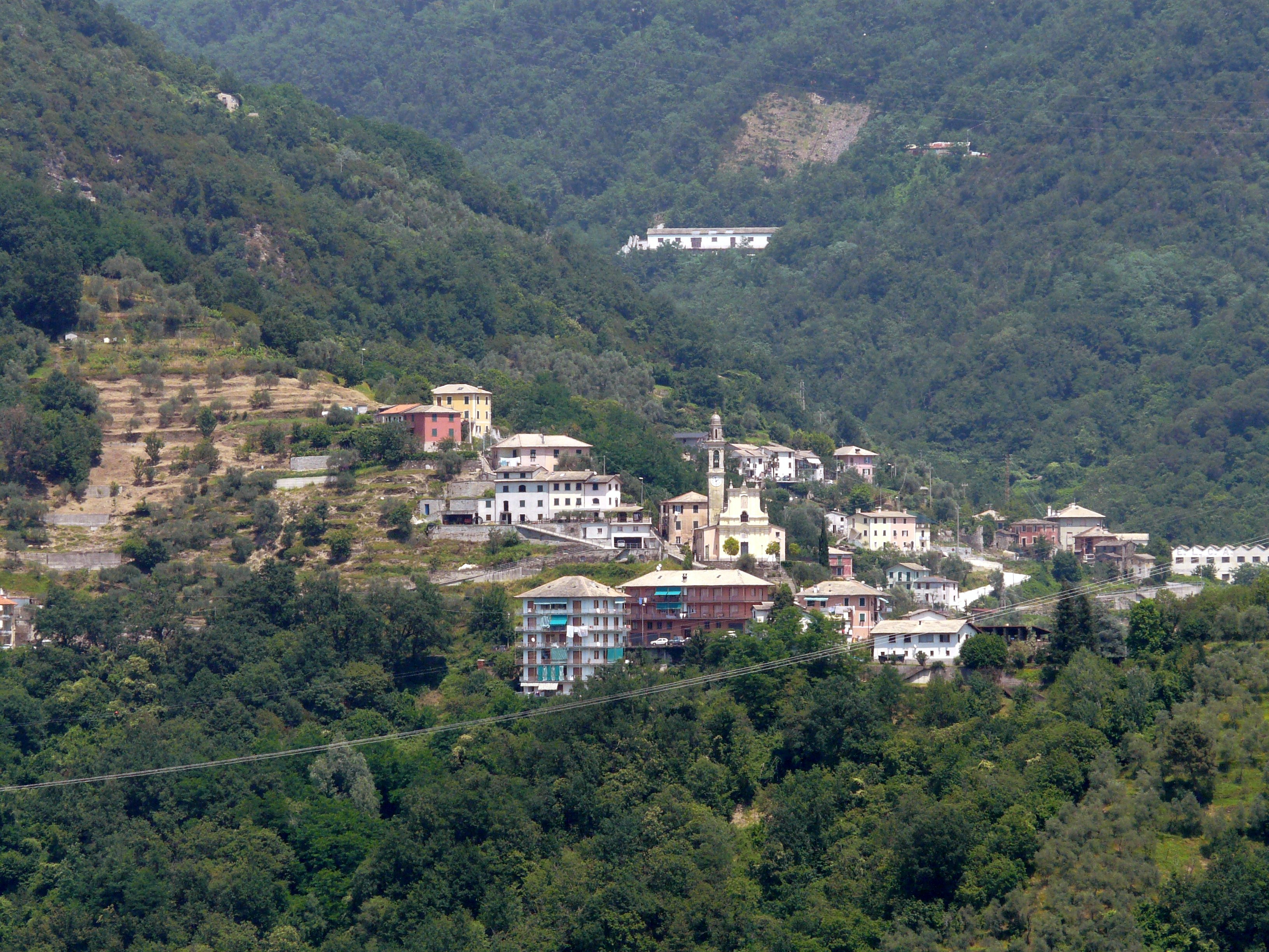 Panorama di Cornia, Moconesi, Liguria, Italia